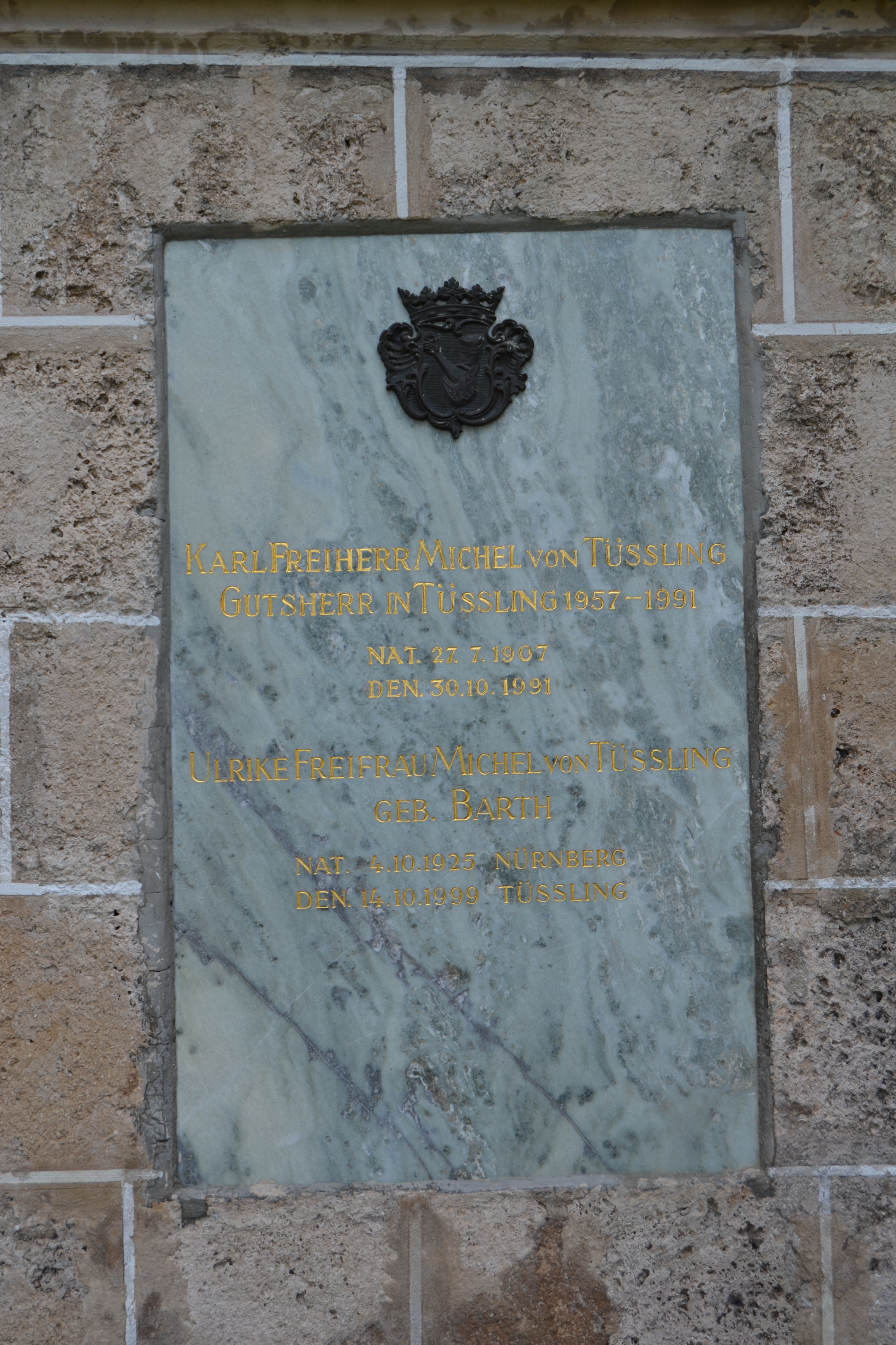 Katholische Wallfahrtskirche Unschuldige Kindlein Heiligenstatt (zu Tüßling); gotische Saalkirche, Tuffquaderbau, Chor 1373 geweiht, Langhaus vor 1451, Veränderungen 1629, Turmoberteil 1635 und 1702, sogenannter Kreuzgang 1724; Grufthalle der Tüßlinger Schlossbesitzer, um Mitte 19. Jahrhundert; Friedhofsummauerung, 18./19. JahrhundertThis is a photograph of an architectural monument.